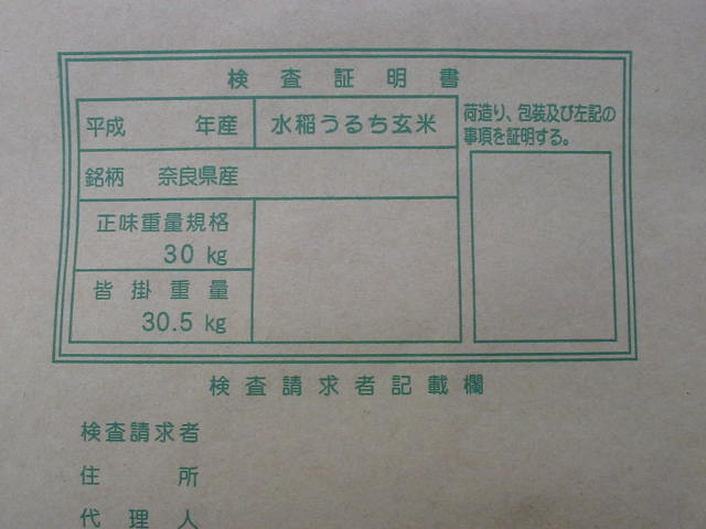 検査証明書（ひな形）